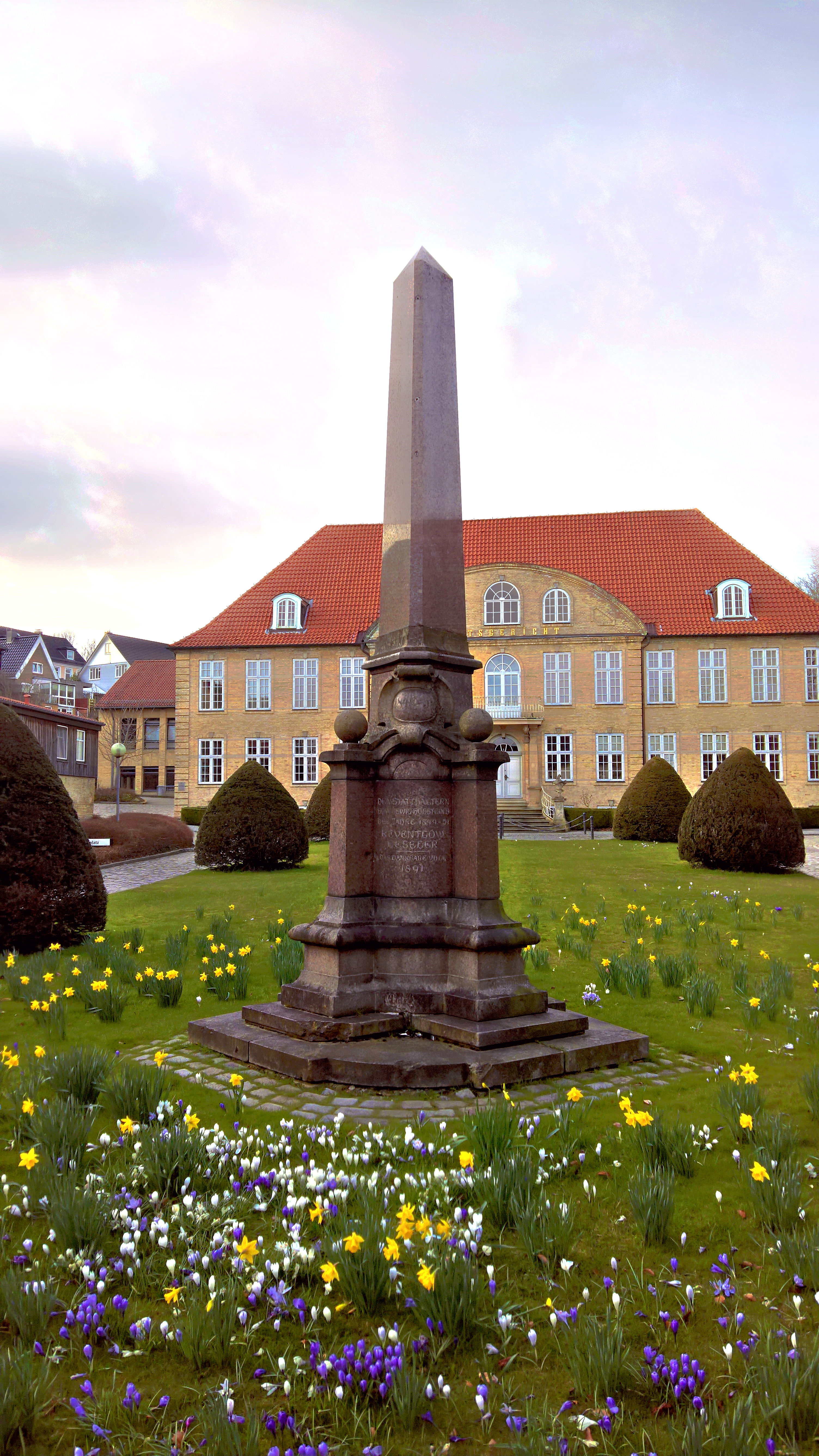 Rest (Sockel und Obelisk) des Reventlou-Beseler-Denkmals in Schleswig